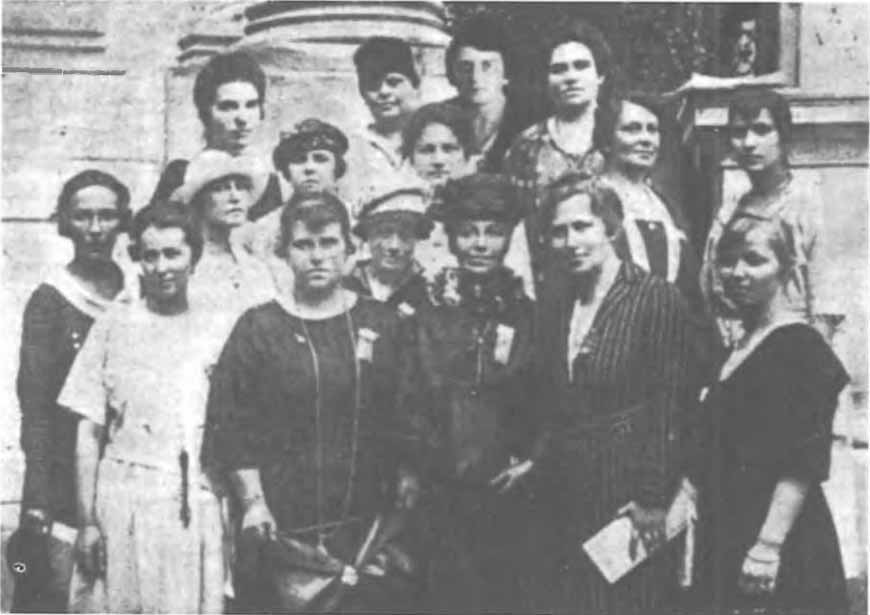 Українська делегація на конгресі Ліги Миру і Свободи у Відні (1921 р.) Перший ряд зправа: Харитя Кононенко, д-р Надія Суровцова, Валерія О’Коннор-Вілінська, Оксана Храпко-Драгоманова, Мілєна Лисяк (Рудницька). Другий ряд зправа: Н. Табакар, Ольга Галаган, Олена Залізняк, Івга Лоська, Оксана Лотоцька-Токаржевська, Н. Ковалів. Третій ряд зправа: Олена Січинська-Левицька, Н. Даскалюк, Н. Удовиченко, Бланка Баранова (Бачинська).